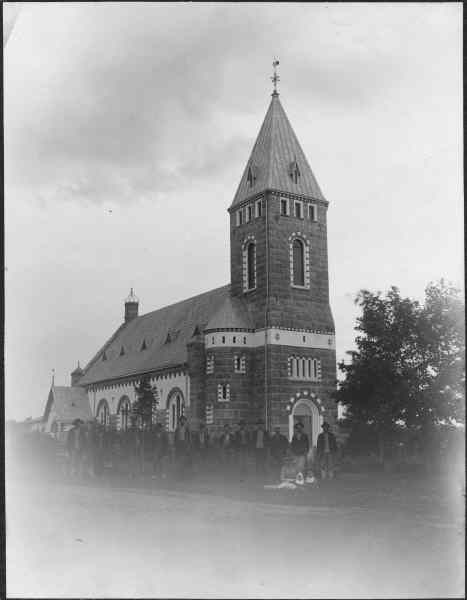 Bäckaby kyrka